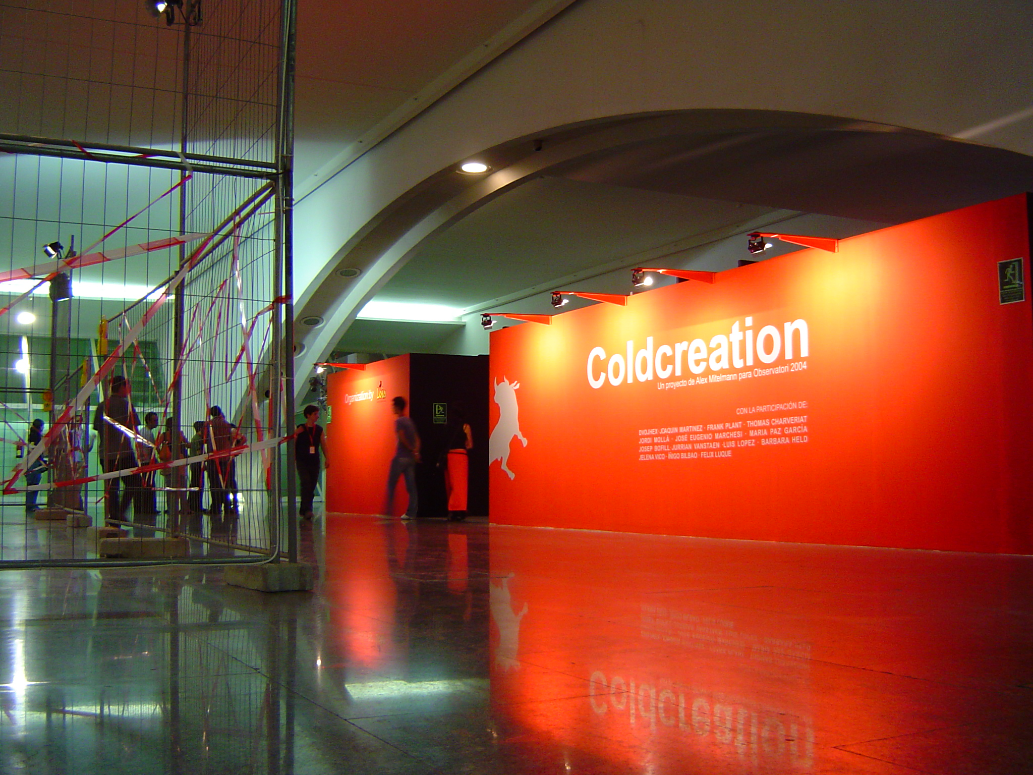 Coldcreation gallery stand at Observatori 2004, Museu de les Ciències Príncipe Felipe, Valencia, Spain